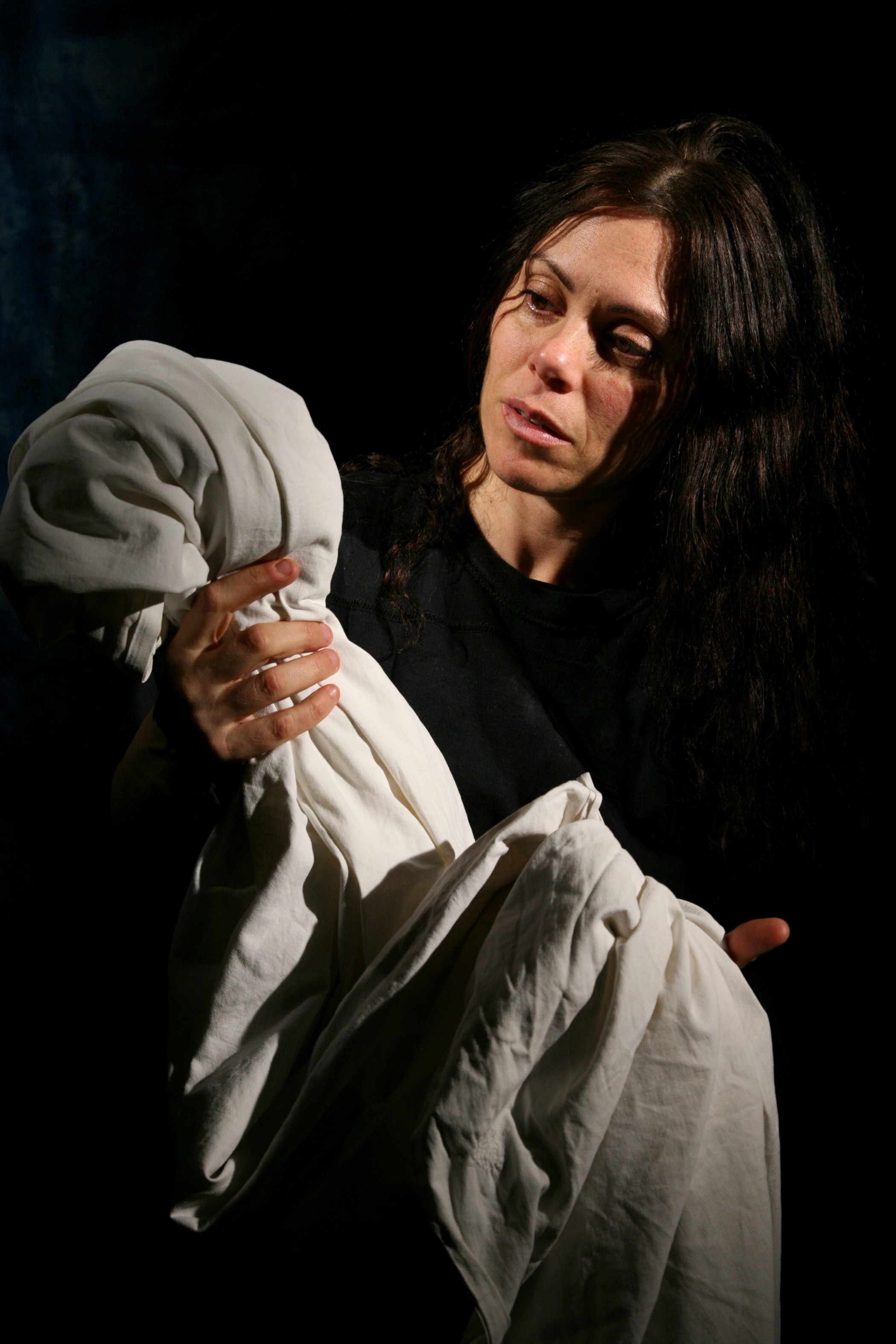 מיקי פלג-רוטשטיין בהצגת היחיד "פשוטה"